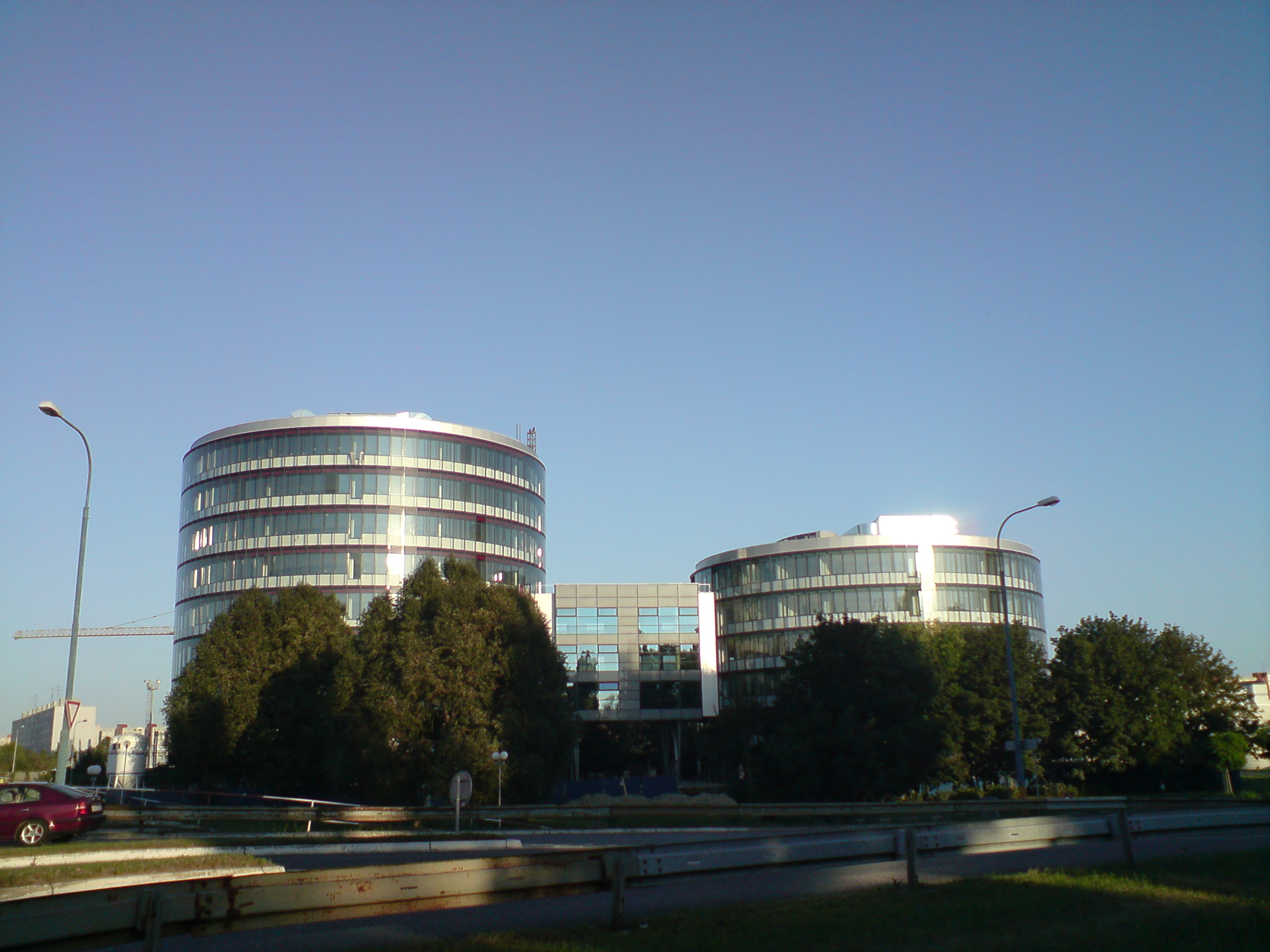 Administratívne centrum Petržalka